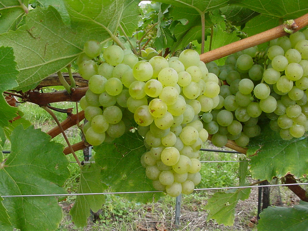 Traube der Weißweinsorte Neuburger Klon Kr 7 - im Dateinamen ist ein Schreibfehler beim Sortennamen enthalten - richtig Neuburger